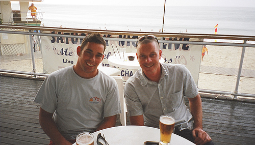 Noosa Lifesaving Clubhouse. Queensland, Australia.Noosa Lifesaving Clubhouse